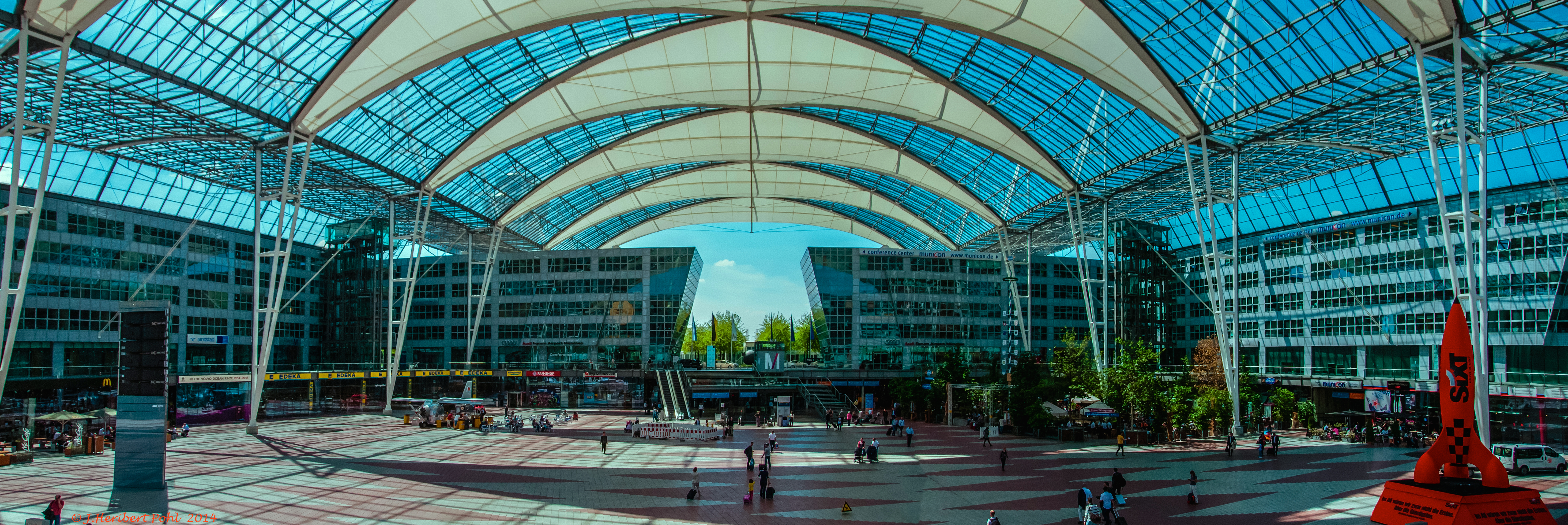 München, Flugplatz, Plaza zwischen den Terminals (Panoramaaufnahme aus 5 Einzelbildern)